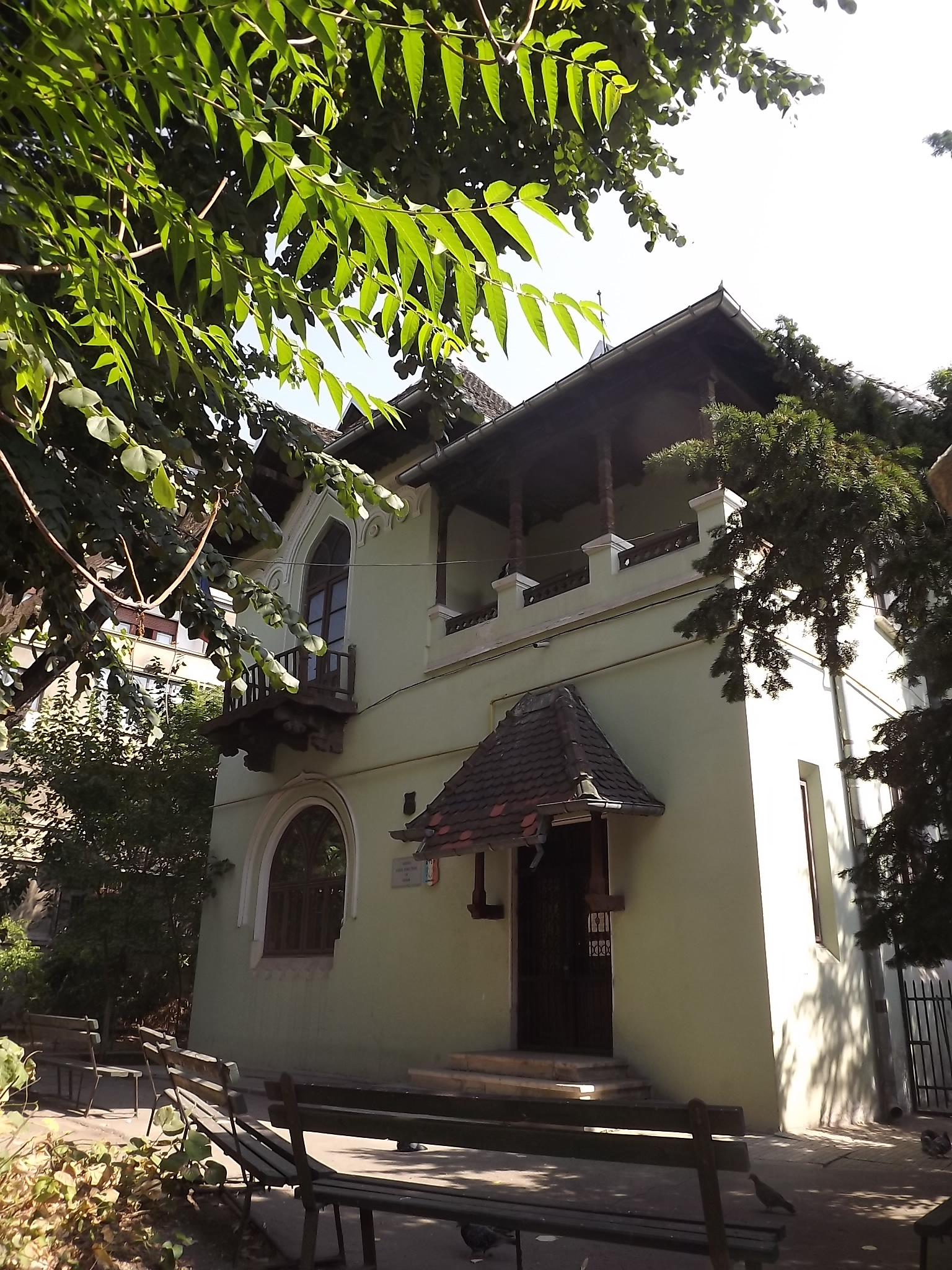 Casa Zentler